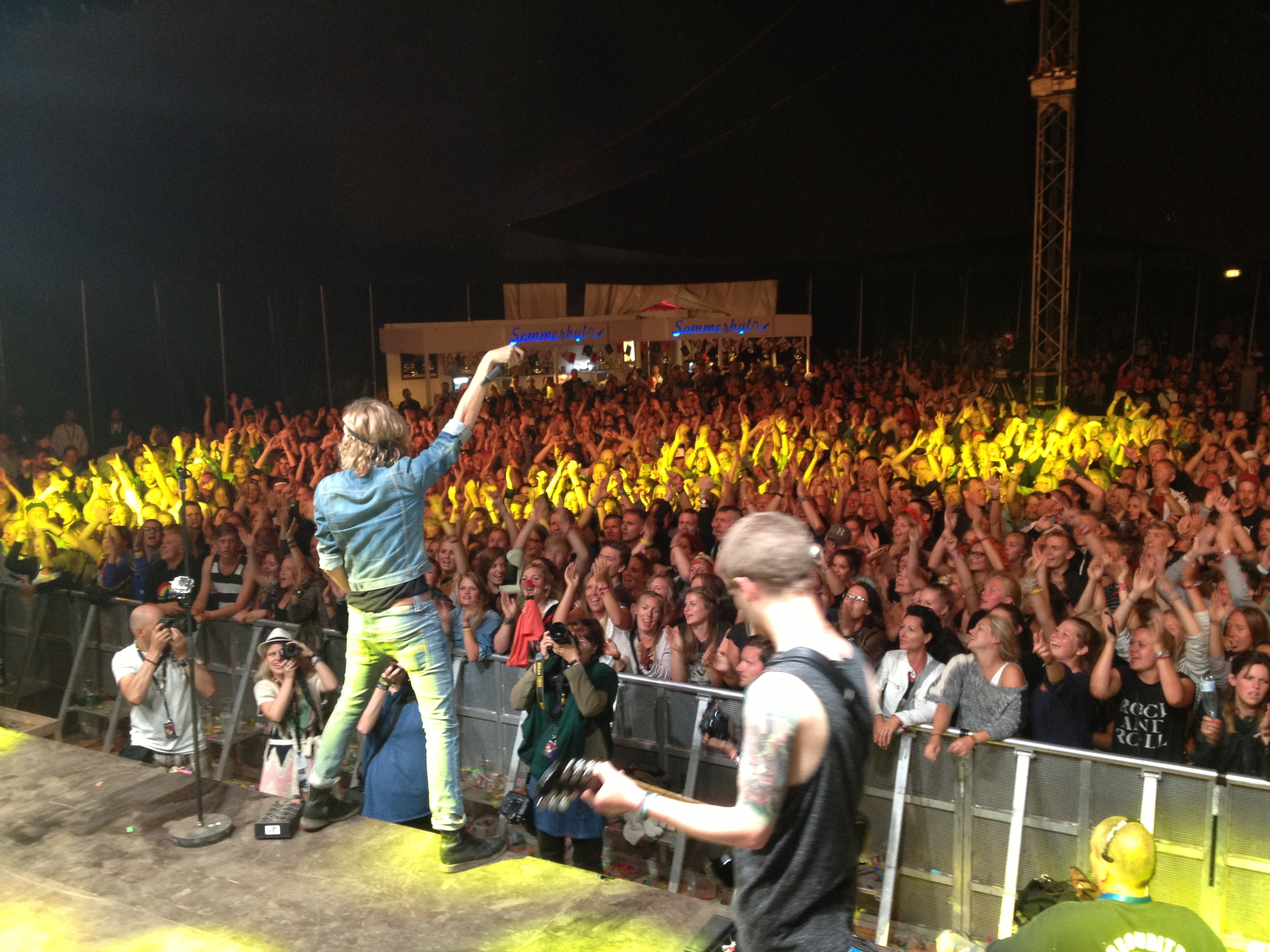 Dúné under deres Wild Hearts Tour koncert på Smukfest '13.